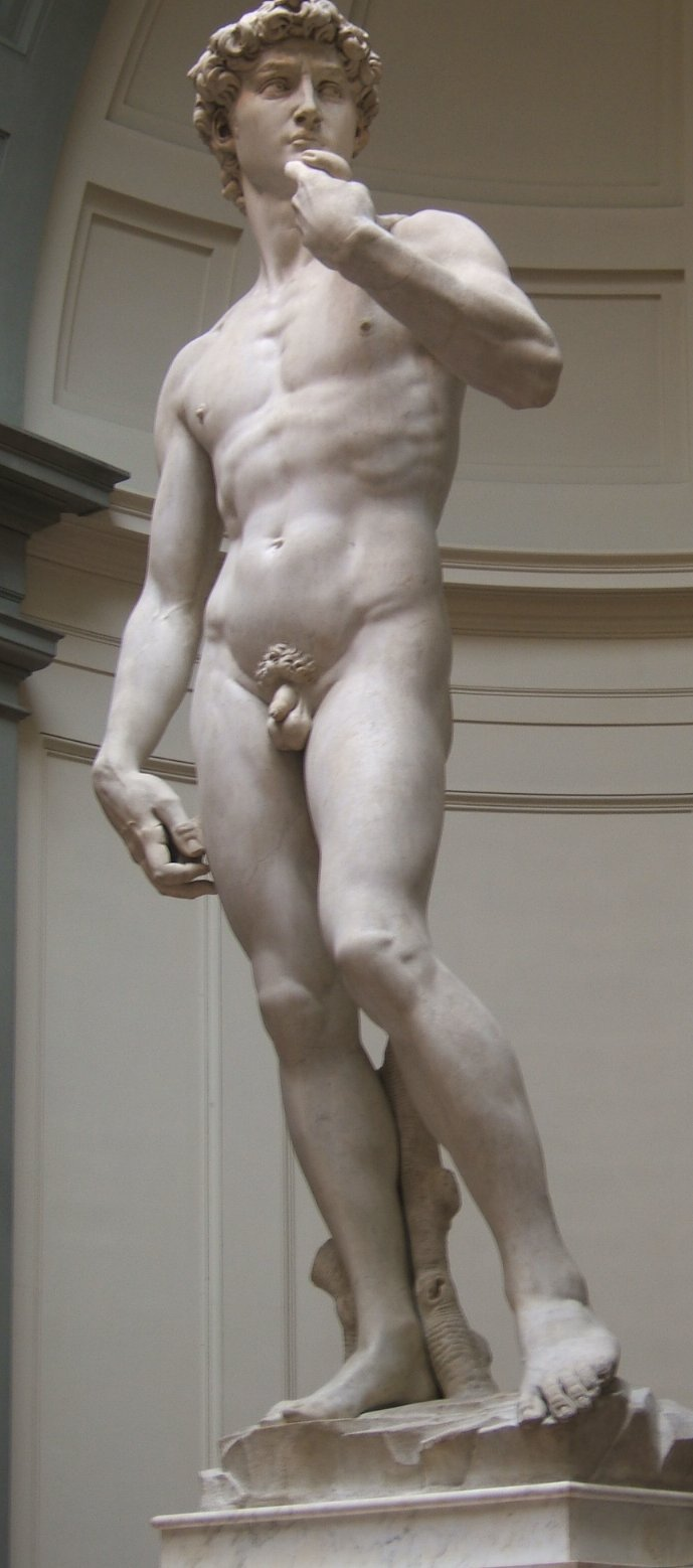 El David de Miguel Ángel